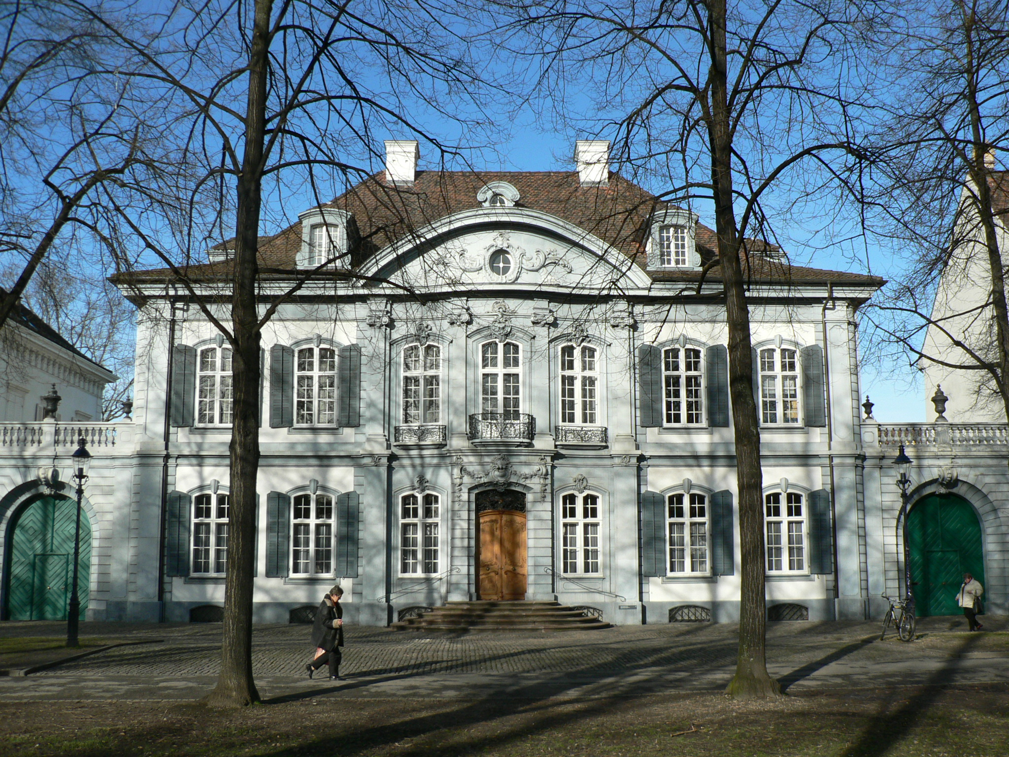 Wildt'sches Haus, Basel, Switzerland